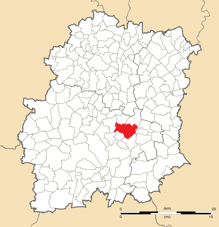 Carte de position de Cerny en Essonne (91)